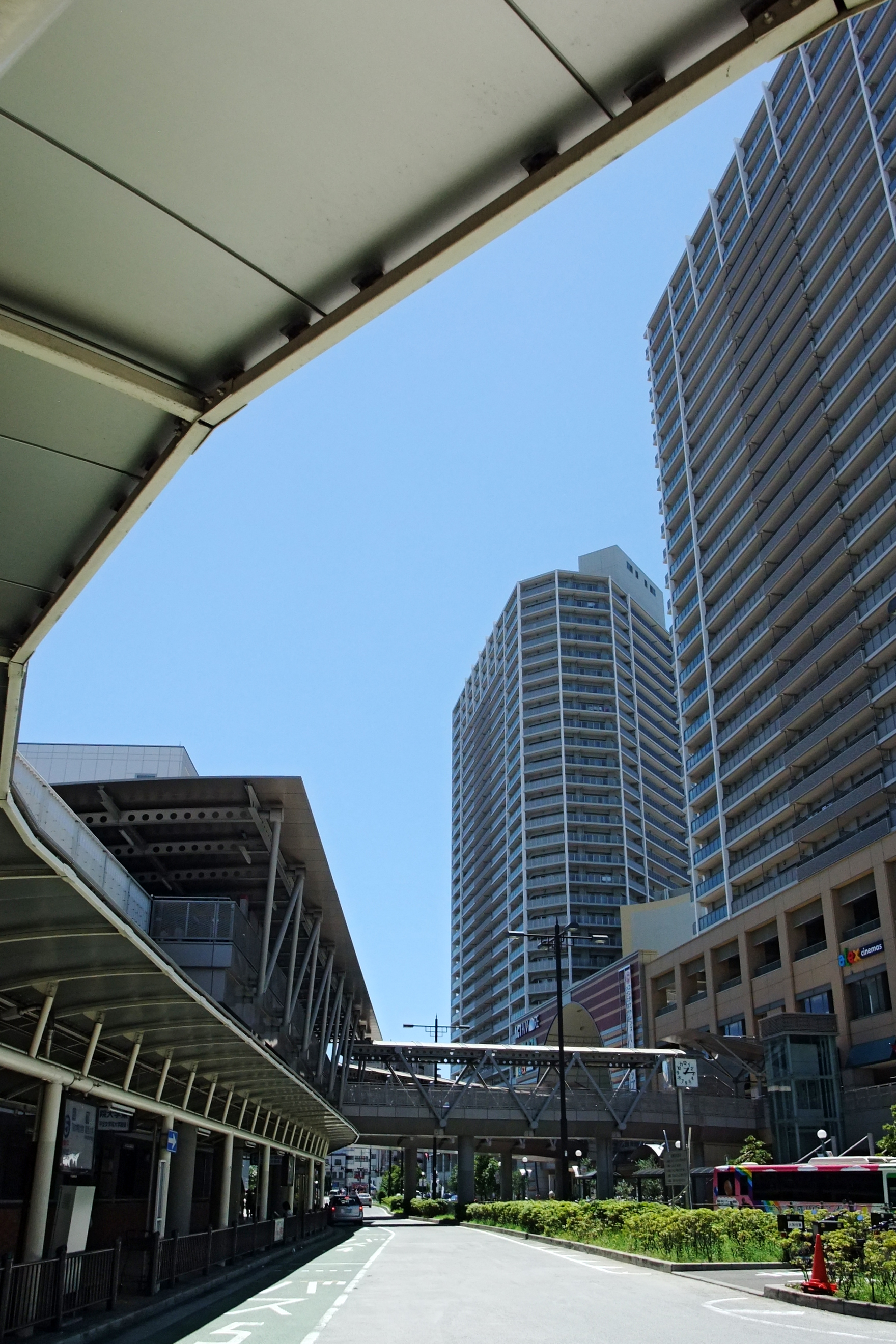 Takatsuki Station in Takatsuki, Osaka prefecture, Japan